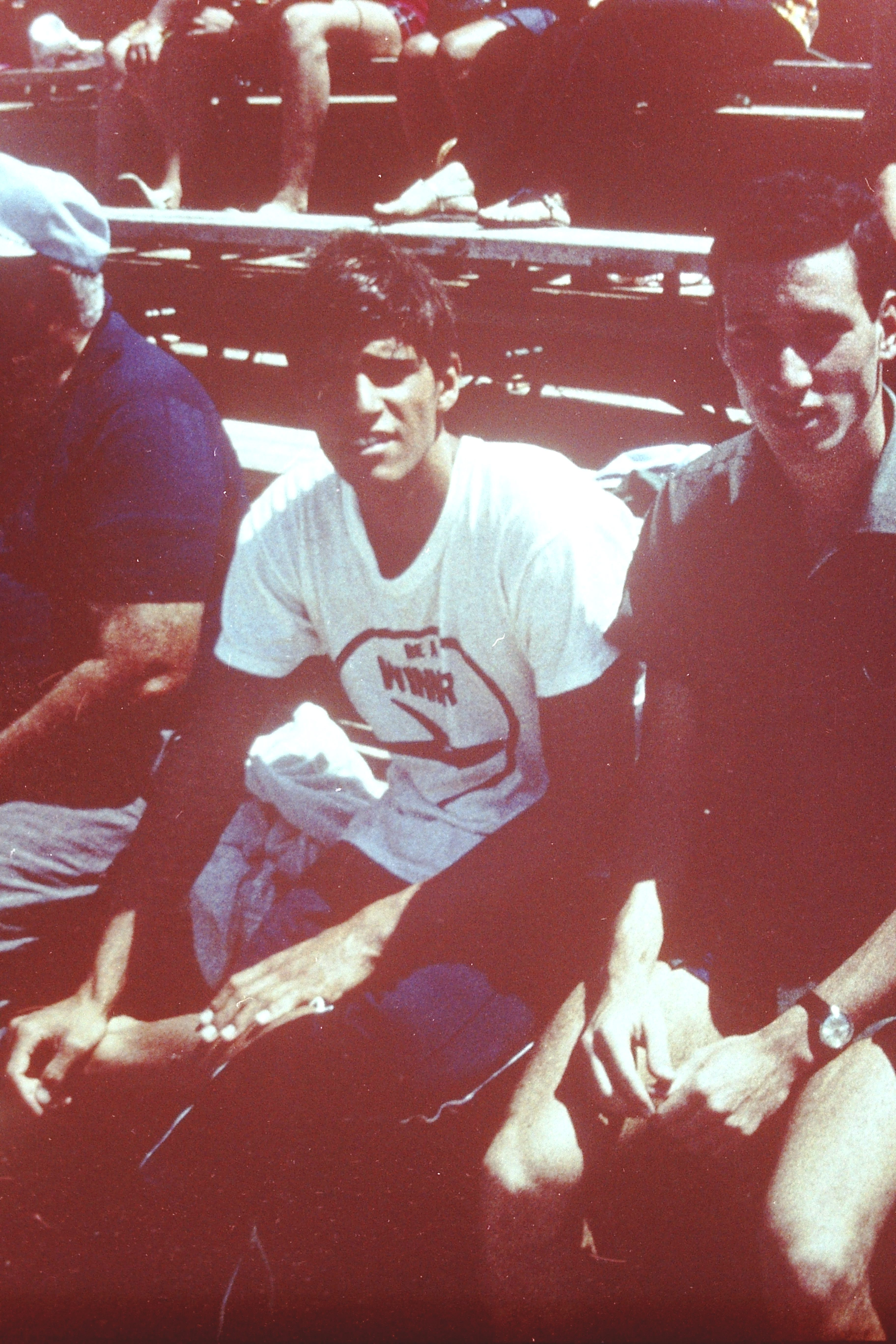 יואב יעקובי ומארק ספיץ בתחרויות המכביה 1969 בבריכת גלי גיל ברמת גן